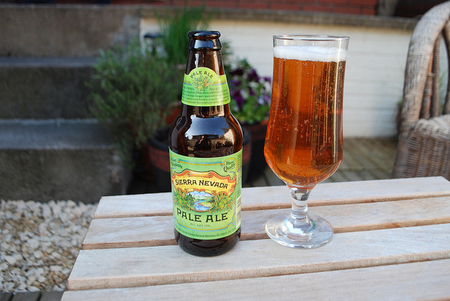 A seminal US ale. 5.6% ABV.